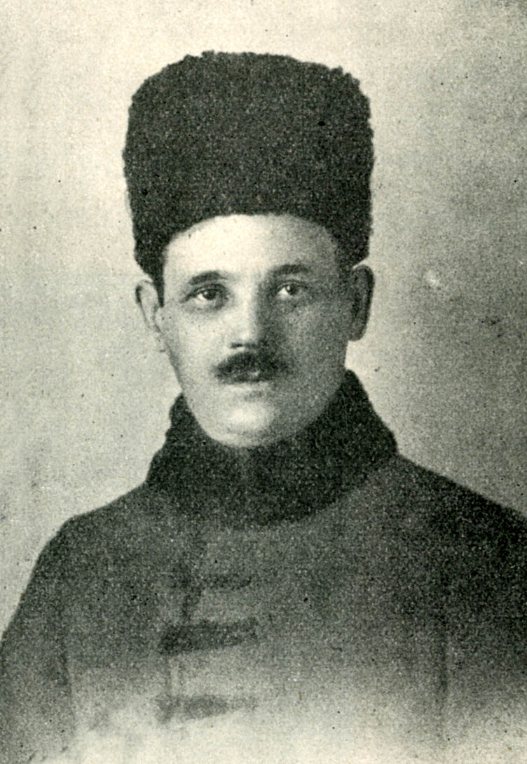 Wawrzyniec Dayczak - polski architekt